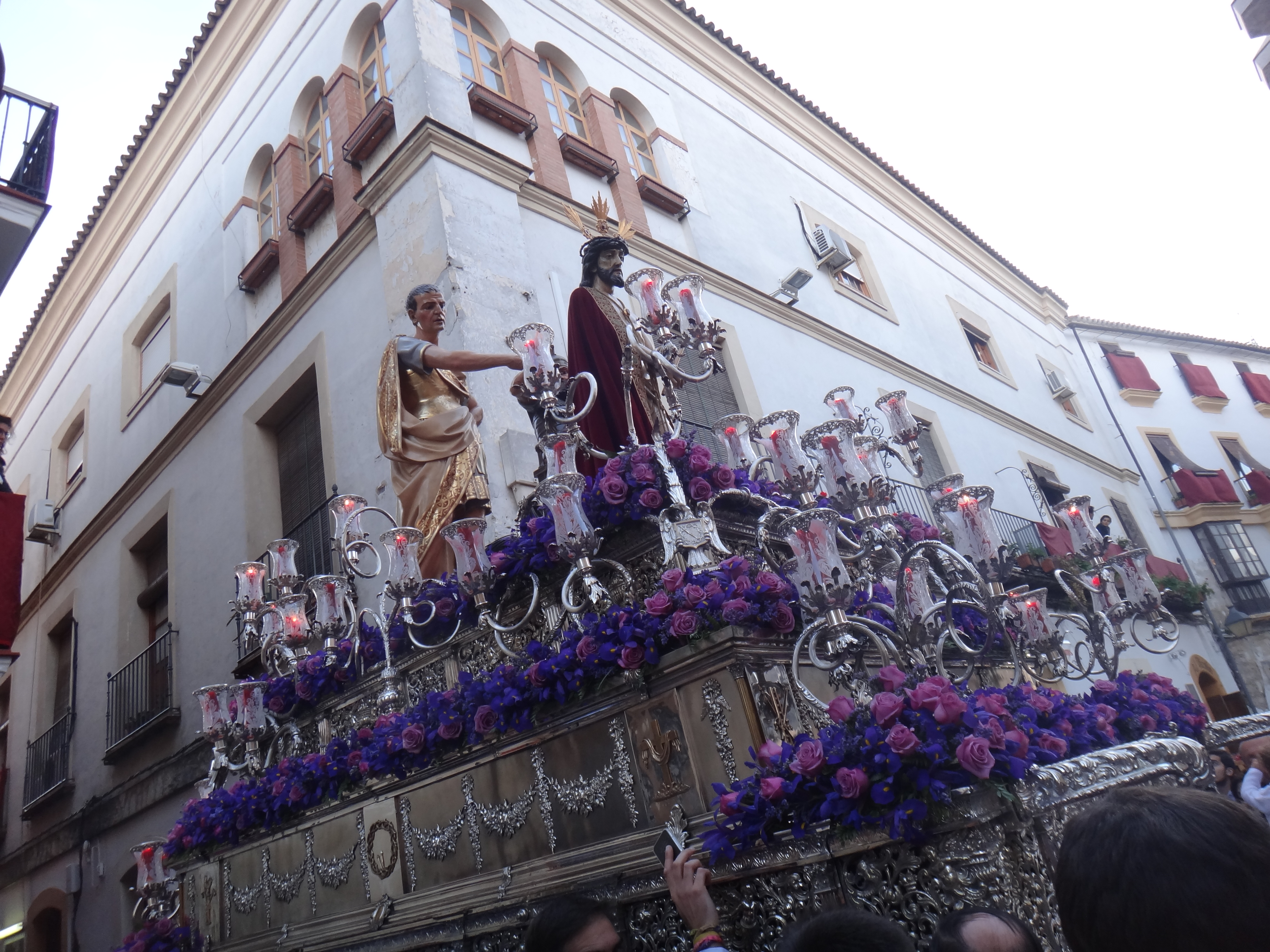 El Mayor Dolor. Semana Santa de Jerez de la Frontera 2015 (Andalucía, España)